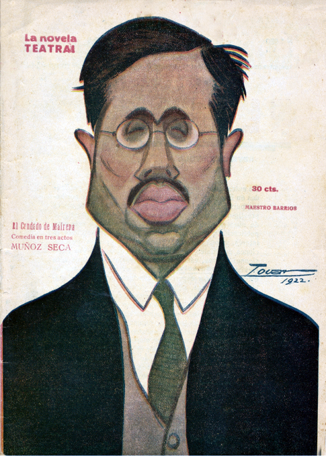 Caricatura del maestro Barrios.